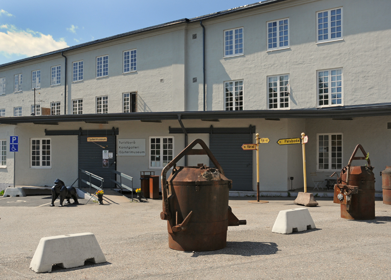 Hälleforsnäs bruk